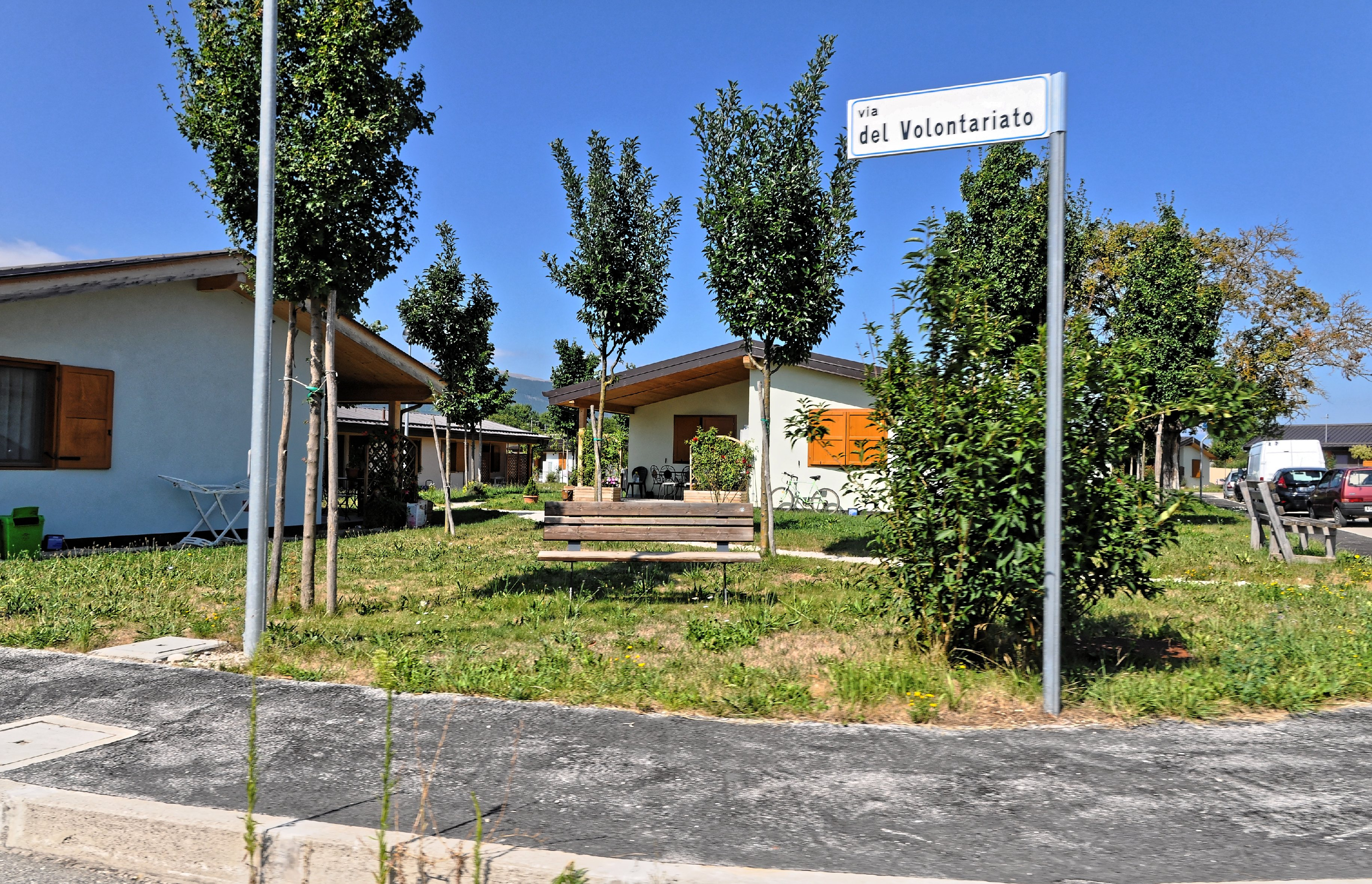 Onna (L’Aquila) 2013 Dieses Foto entstand in Zusammenarbeit mit Stadtbesichtigungen.de Die Seiten Stadtbesichtigungen.de, der dazugehörige Reise Blog sowie die Facebookseite: Stadtbesichtigungen Rom dürfen dieses Bild für Ihre Veröffentlichungen ohne den Hinweis auf Wikipedia, Commons bzw der Lizenz verwenden. Die Verantwortlichen habe von mir (Ra Boe) die Originaldaten zur freien Verfügung übermittelt bekommen.